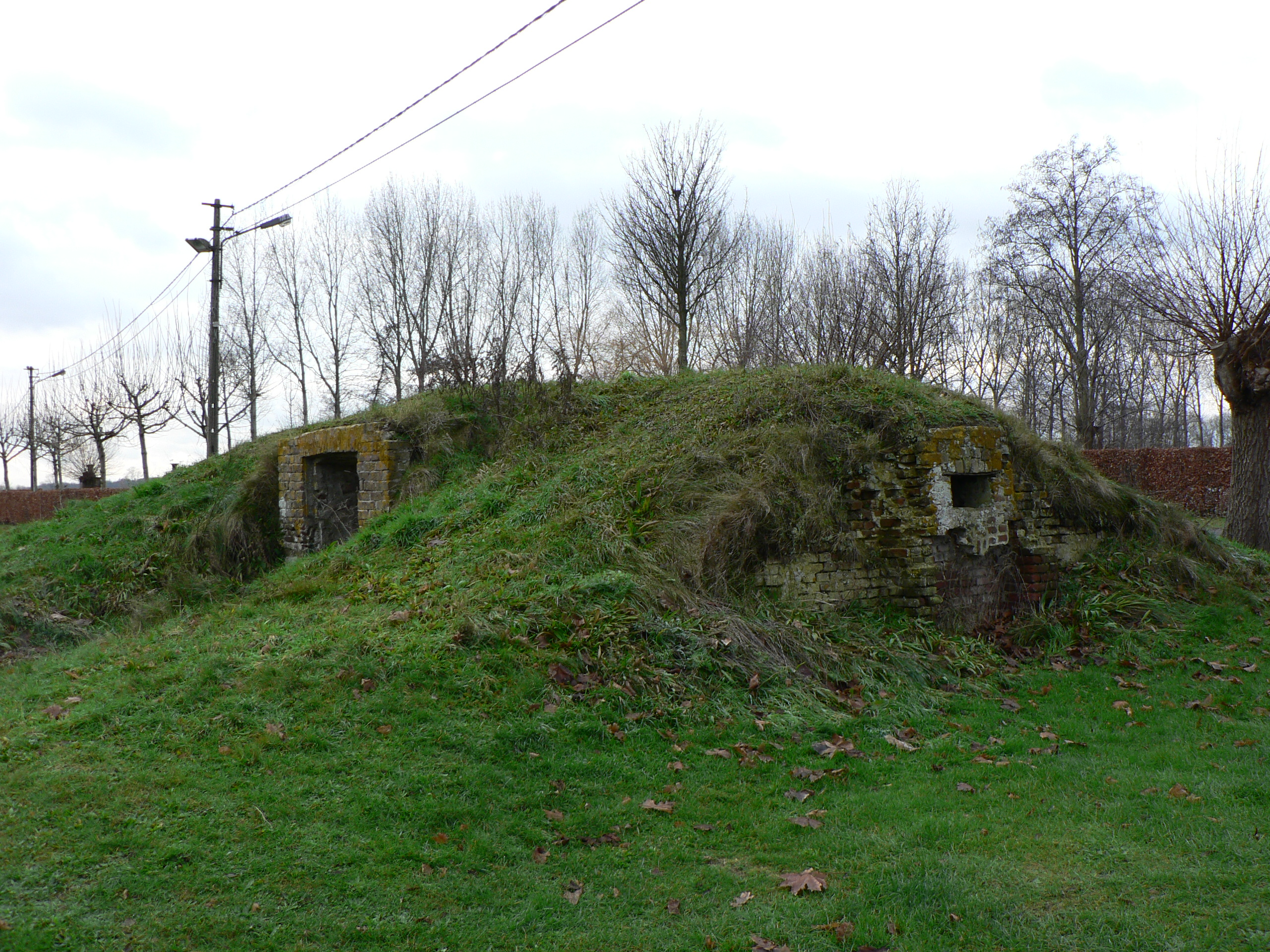 Bunker Zandberghoeve Oedelem